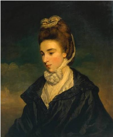 Lady Sarah Lennox